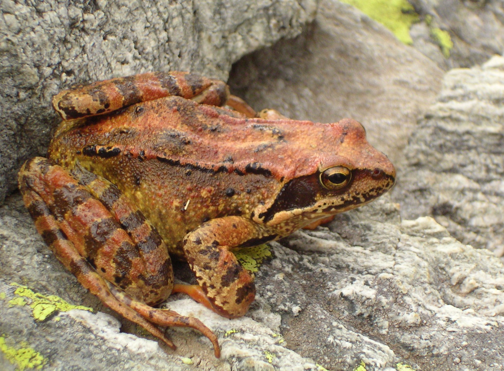 (en) Common Frog (female) Place: Greina, CH Editing: cut (de) Grasfrosch-Weibchen auf einem Stein Aufnahmeort: Greina-Ebene, Schweiz Bearbeitung: GIMP Zugeschnitten